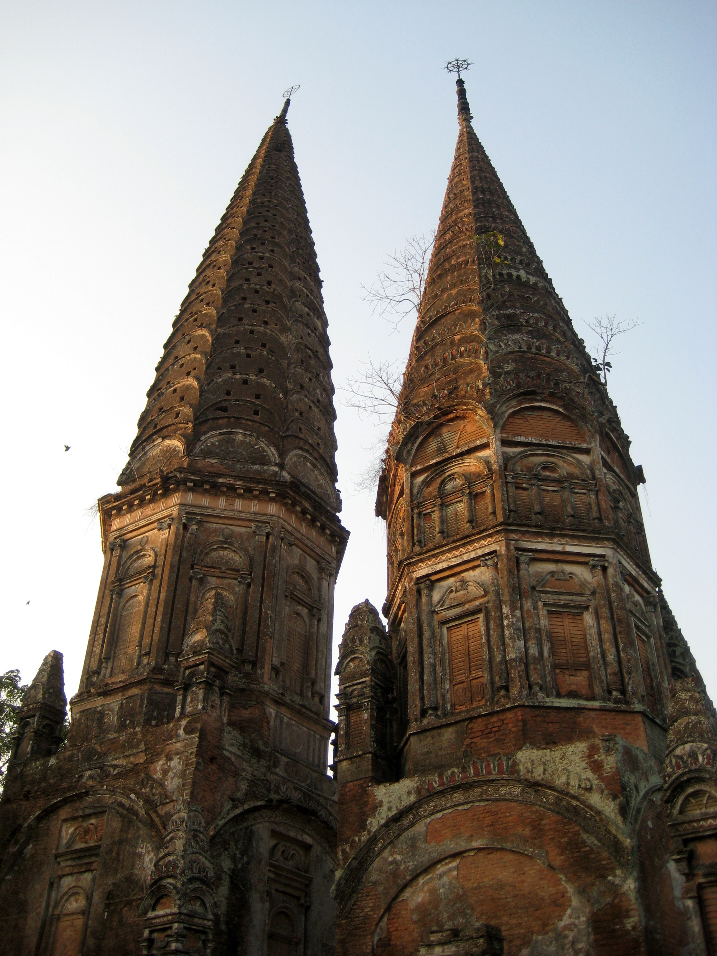 "সোনারং জোড়া মঠ" কথিত ইতিহাসে জোড়া মঠ হিসাবে পরিচিত লাভ করলেও মুলত এটি জোড়া মন্দির। মুন্সীগঞ্জ জেলার টঙ্গীবাড়ী উপজেলার সোনারং গ্রামে অষ্টাদশ শতাব্দীর এই অপূর্ব প্রত্নতত্ত্ব নিদর্শনটি রয়েছে। মন্দিরের একটি প্রস্তর লিপি থেকে জানা যায় এলাকার রূপচন্দ্র নামে হিন্দু লোক বড় কালীমন্দিরটি ১৮৪৩ সালে ও ছোট মন্দিরটি ১৮৮৬ সালে নির্মাণ করেন। ছোট মন্দিরটি মুলত শিবমন্দির। বড় মন্দিরটির উচ্চতা প্রায় ১৫ মিটার। মন্দির দুটির মুল উপাসনালয় কক্ষের সঙ্গের রয়েছে বারান্দা বড় মন্দিরের ১.৯৪ মিটার ও ছোট টিতে ১.৫ মিটার বারান্দা। এছাড়া মন্দিরের সামনের অংশে বেশ বড় আকারের একটি পুকুর রয়েছে।